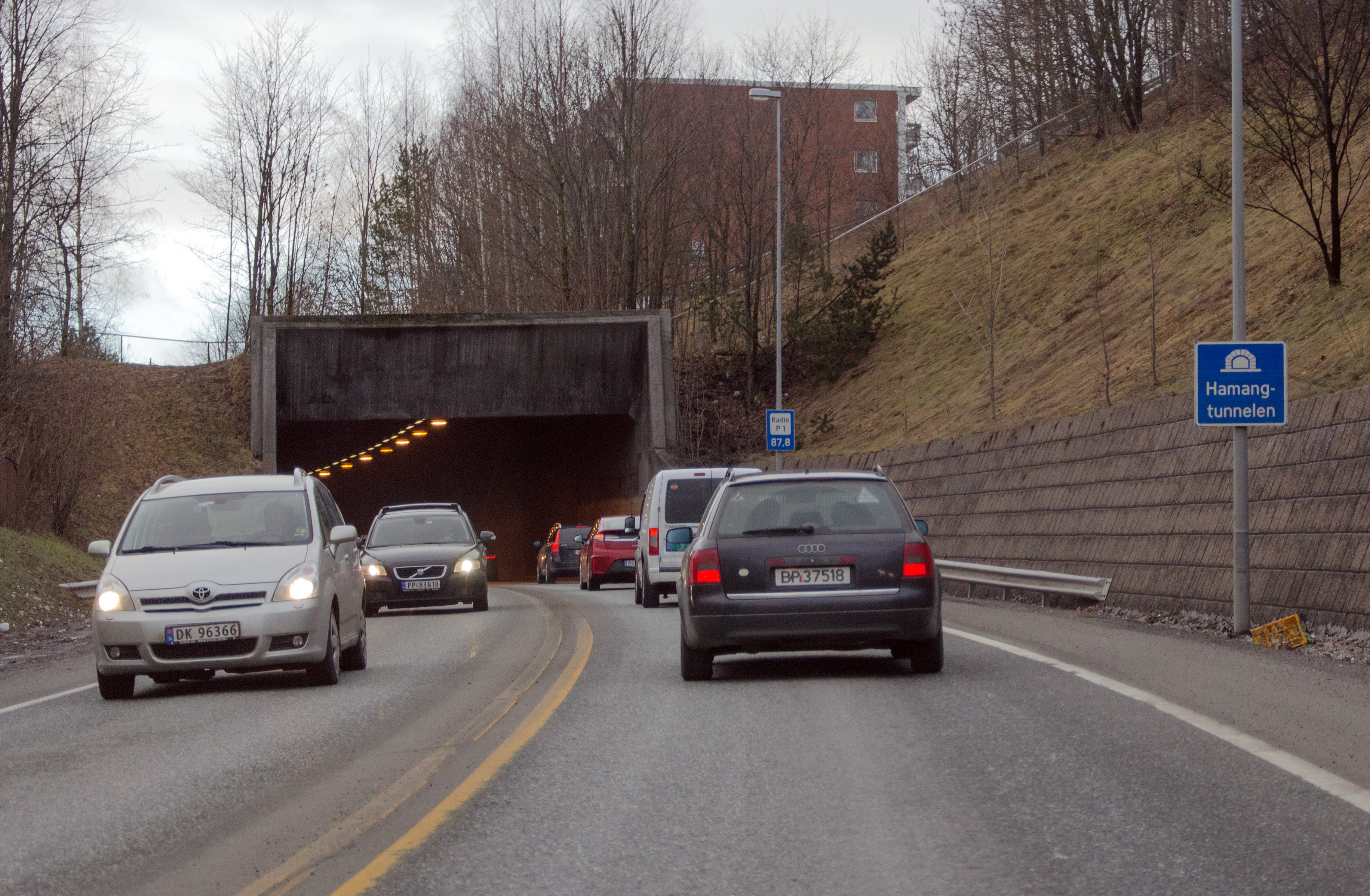 Hamangtunnelen